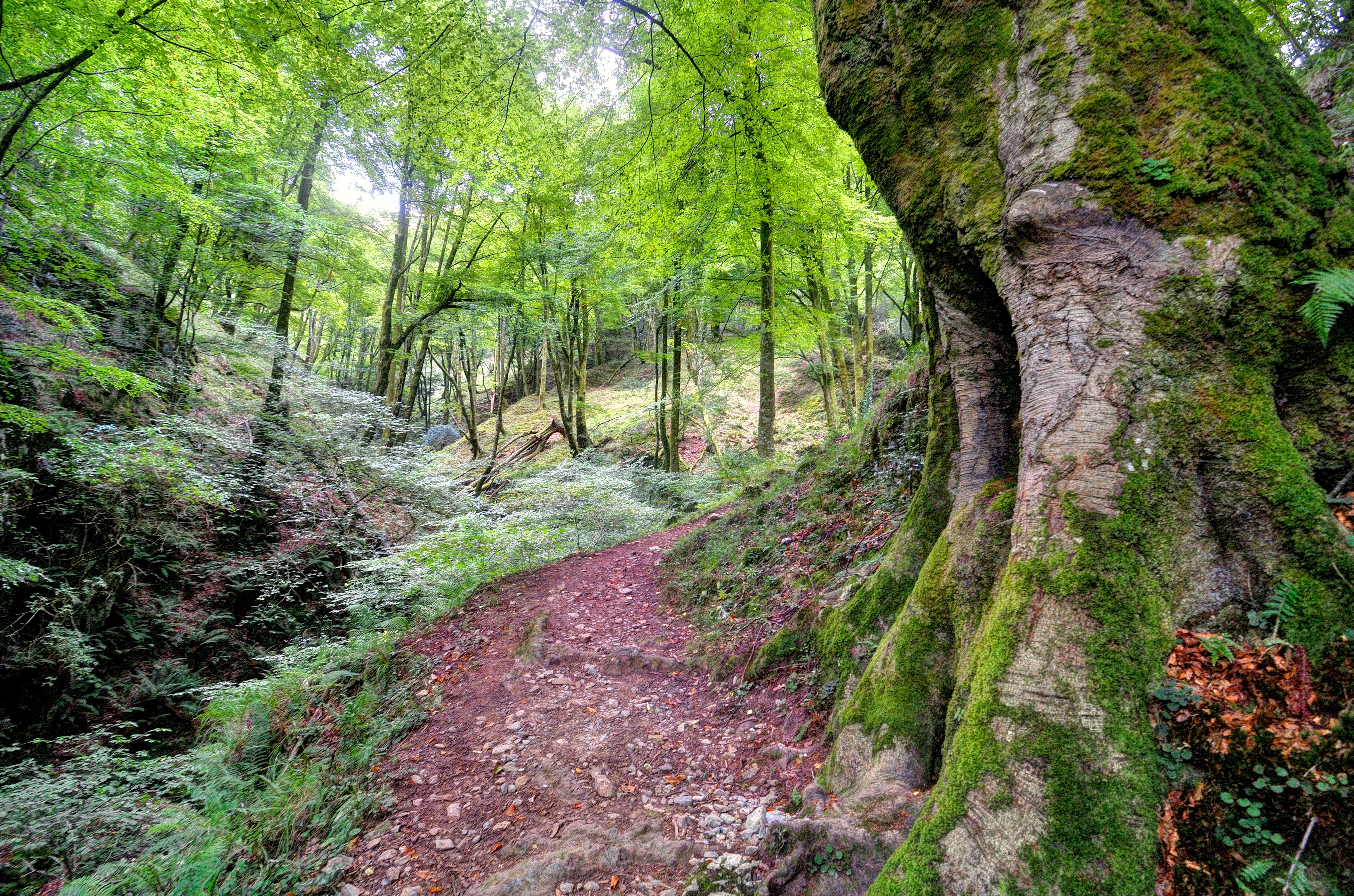 Hayedo de la Biescona, Asturias.